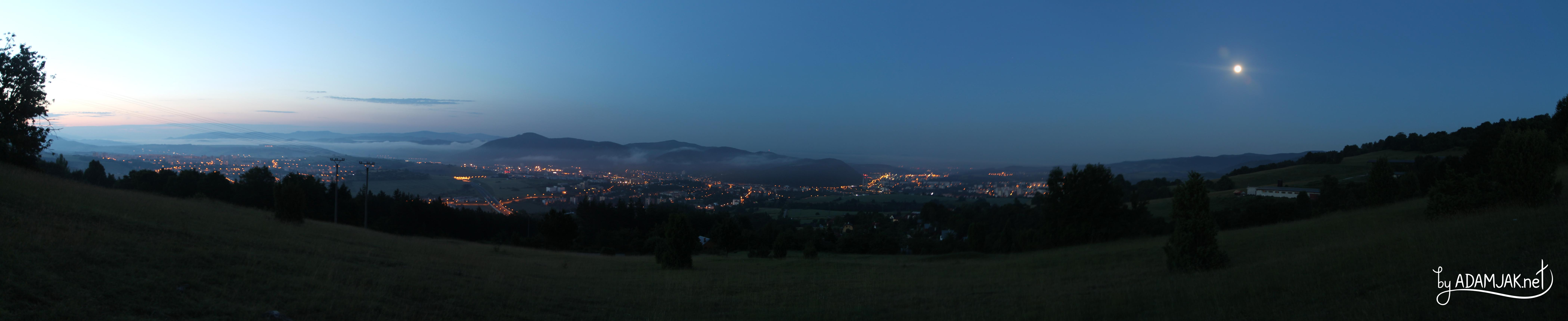 Panoráma mesta Banská Bystrica fotená nadránom z mestskej časti Slnečné stráne.